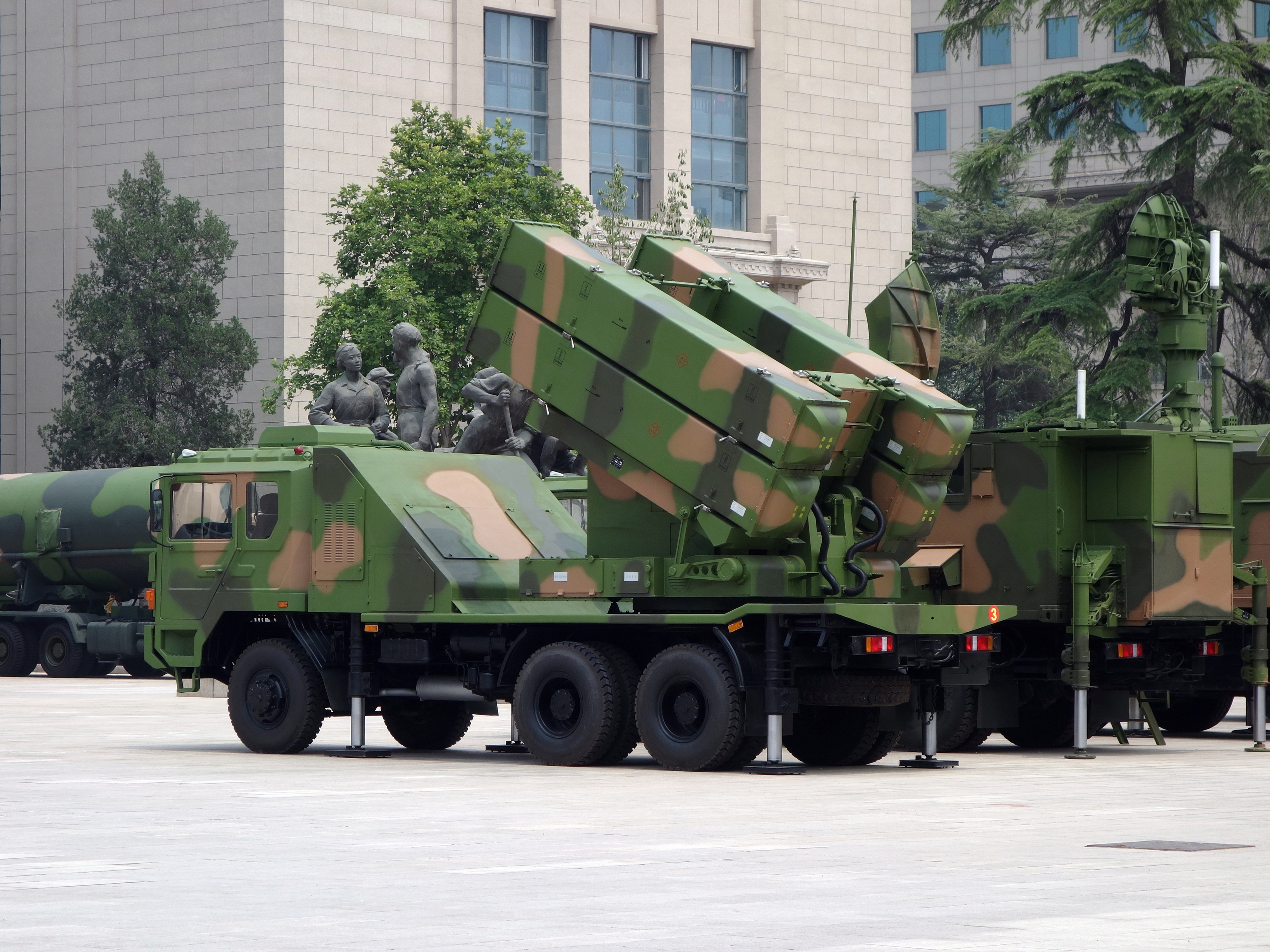 HQ-6A弹炮防空武器系统防空导弹发射车，拍摄于中国人民革命军事博物馆。